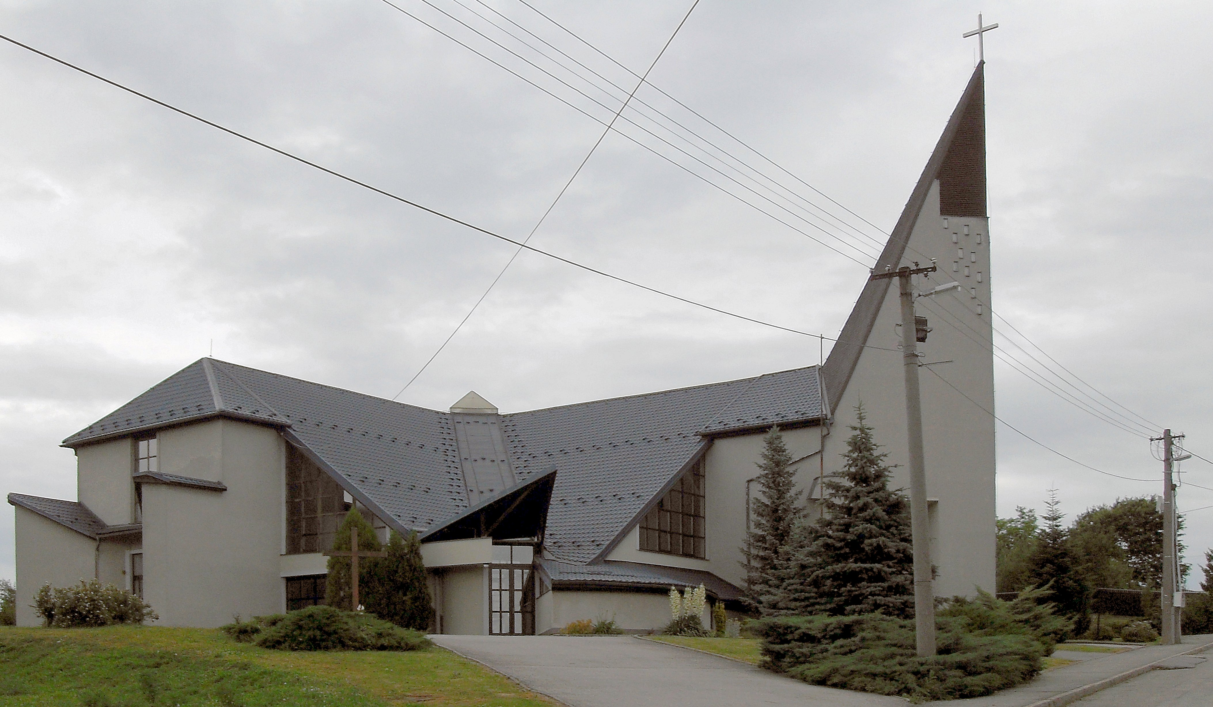 Kostol Kostol Sedembolestnej Panny Márie v Rozhanovce